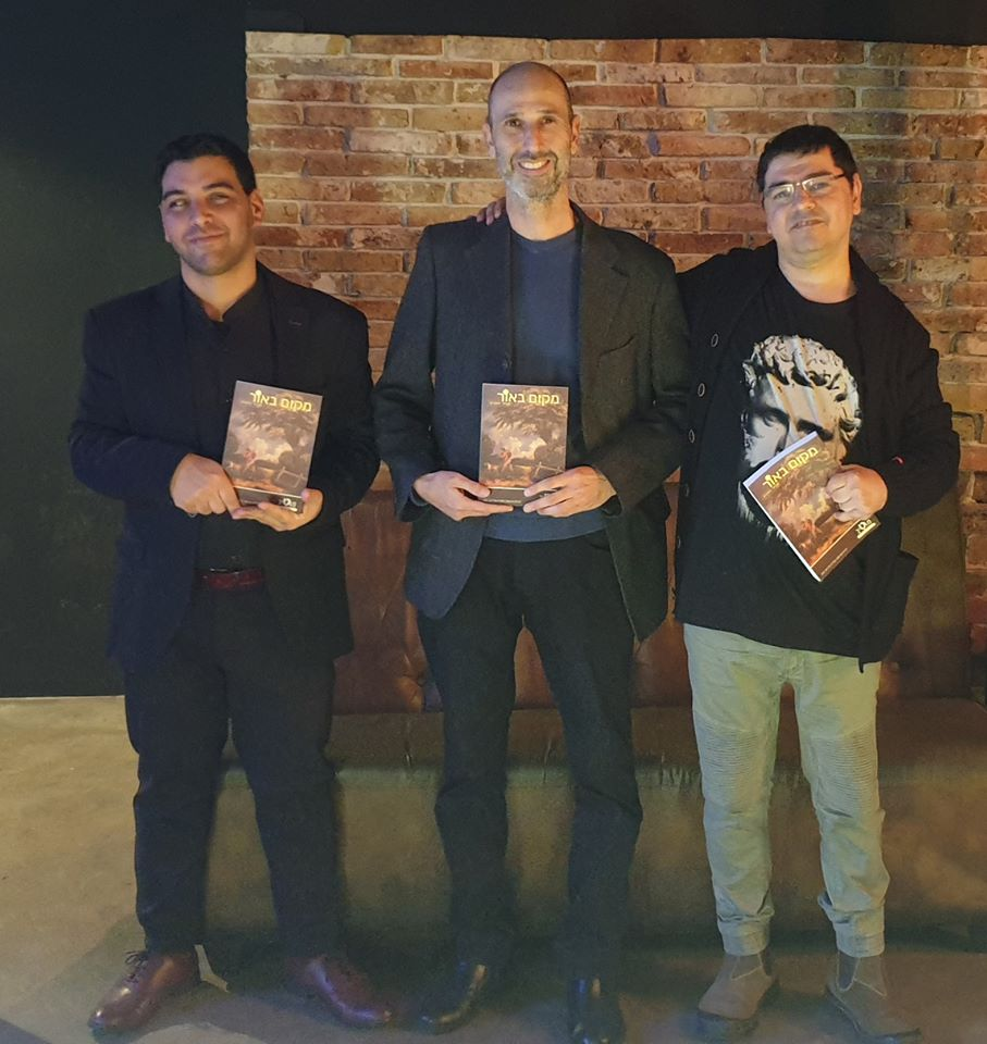 עורכי כתב העת מוטיב